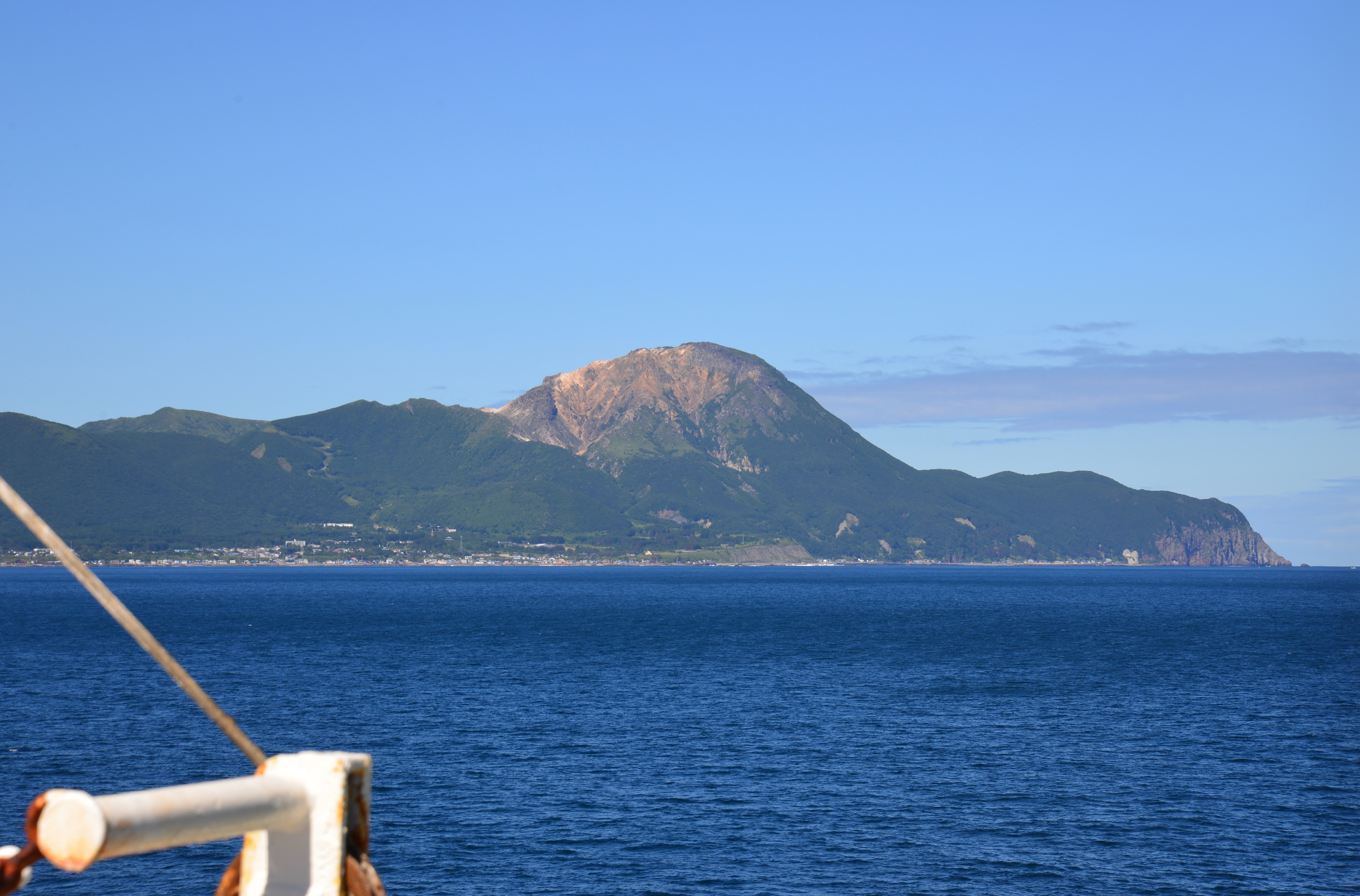 津軽海峡から望む恵山と恵山岬